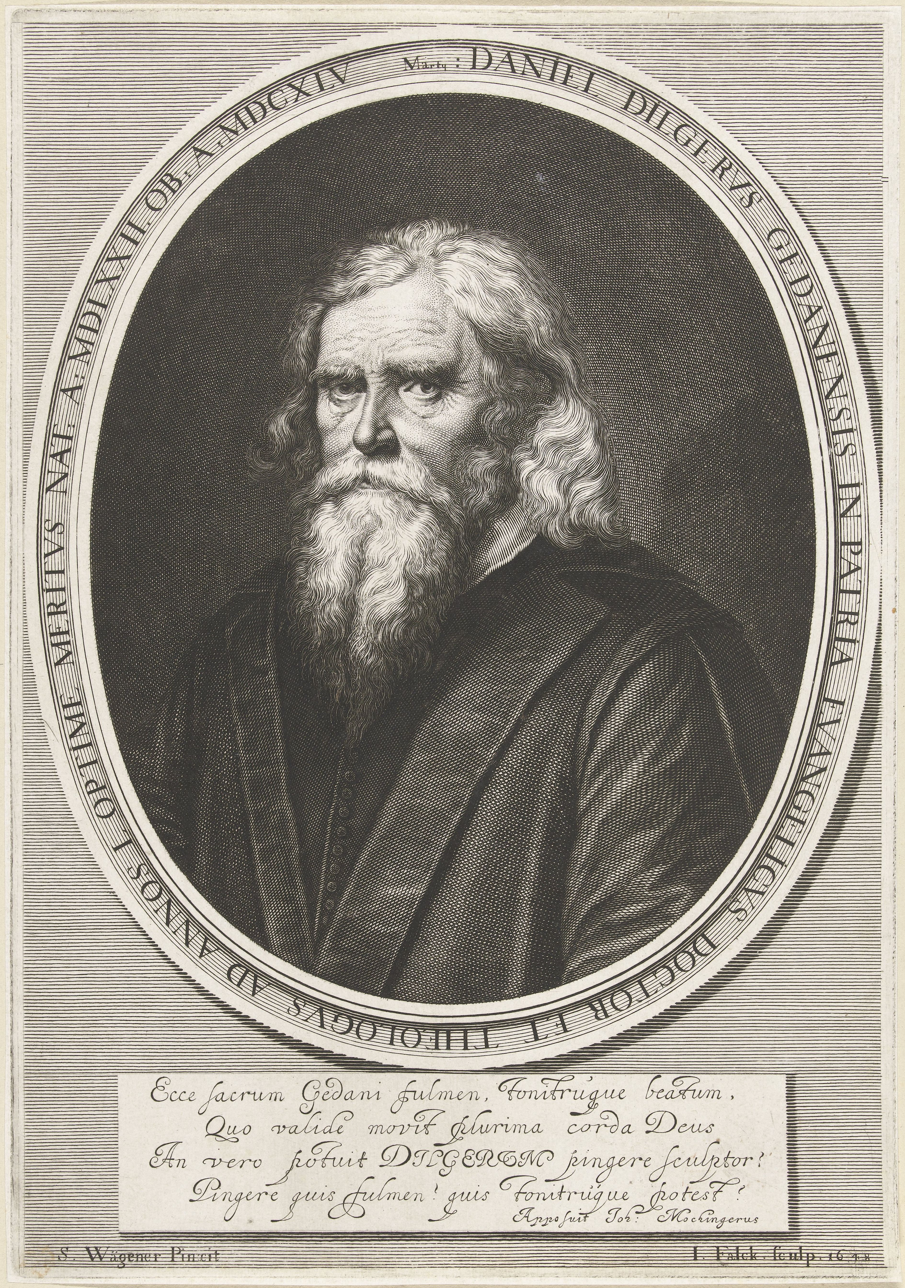 IdentificatieTitel(s): Portret van Daniel DilgerDaniel Dilgervs (titel op object)Objecttype: prent Objectnummer: RP-P-OB-50.569Catalogusreferentie: Hollstein Dutch 230Block 230Opschriften / Merken: verzamelaarsmerk, verso, gestempeld: Lugt 240Omschrijving: Portret van de theoloog Daniel Dilgers, afgebeeld in ovale omlijsting met onderschrift in Latijn.VervaardigingVervaardiger: prentmaker: Jeremias Falck (vermeld op object)naar schilderij van: Salomon Wegner (vermeld op object)schrijver: Johann Mochinger (vermeld op object)Plaats vervaardiging: DanzigDatering: 1648Fysieke kenmerken: gravureMateriaal: papier Techniek: graveren (drukprocedé)Afmetingen: plaatrand: h 313 mm × b 220 mmOnderwerpWie: Daniel DilgerVerwerving en rechtenVerwerving: overdracht van beheer 1816Copyright: Publiek domein